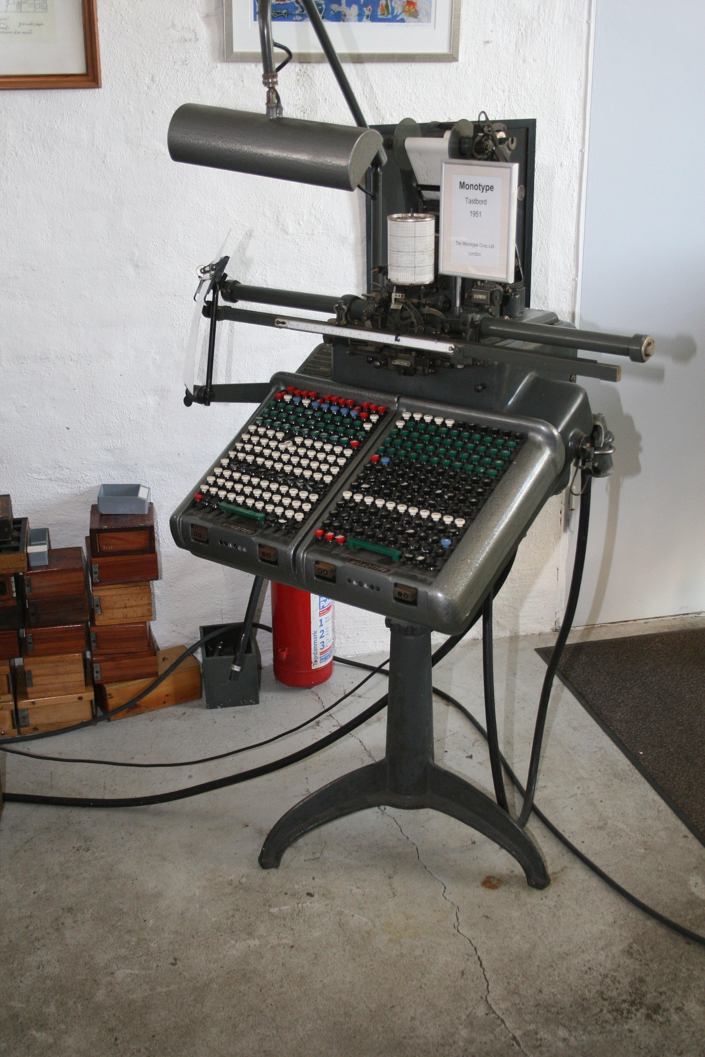 Tastaturenhed for en Monotype sættemaskine. Vingaards Officin i Viborg